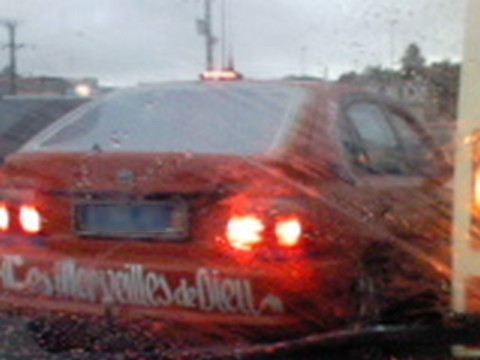 Taxi d'Abidjan